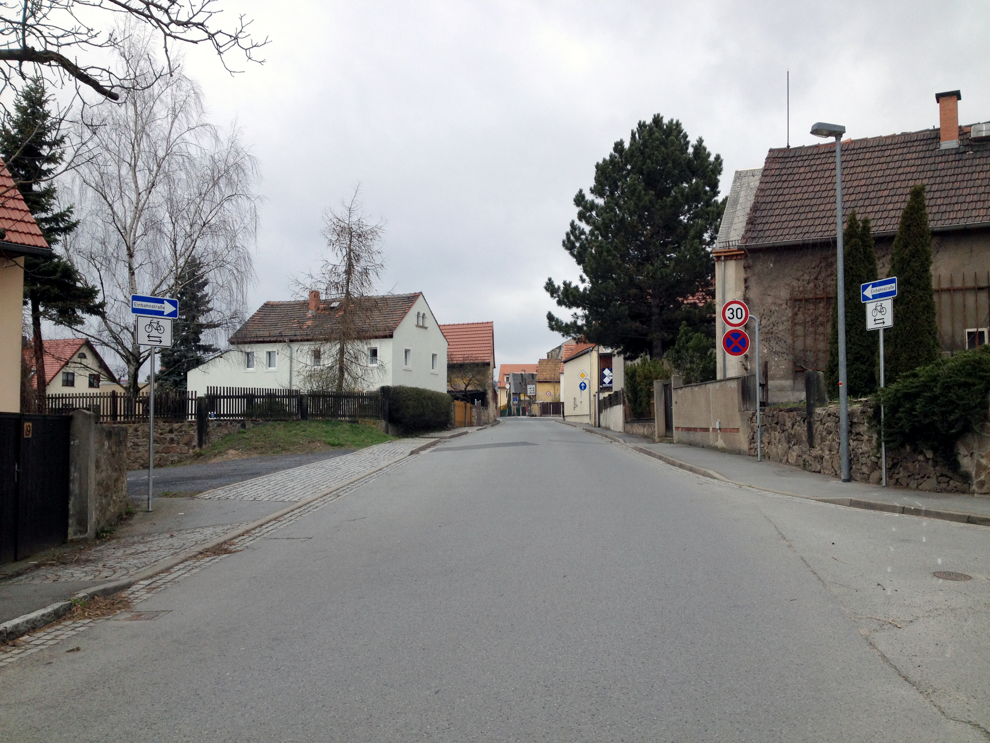 Radebeul (Gemarkung), Kaditzer Straße (Radebeul) nach Norden, rechts die Einmündung der Dresdner Straße